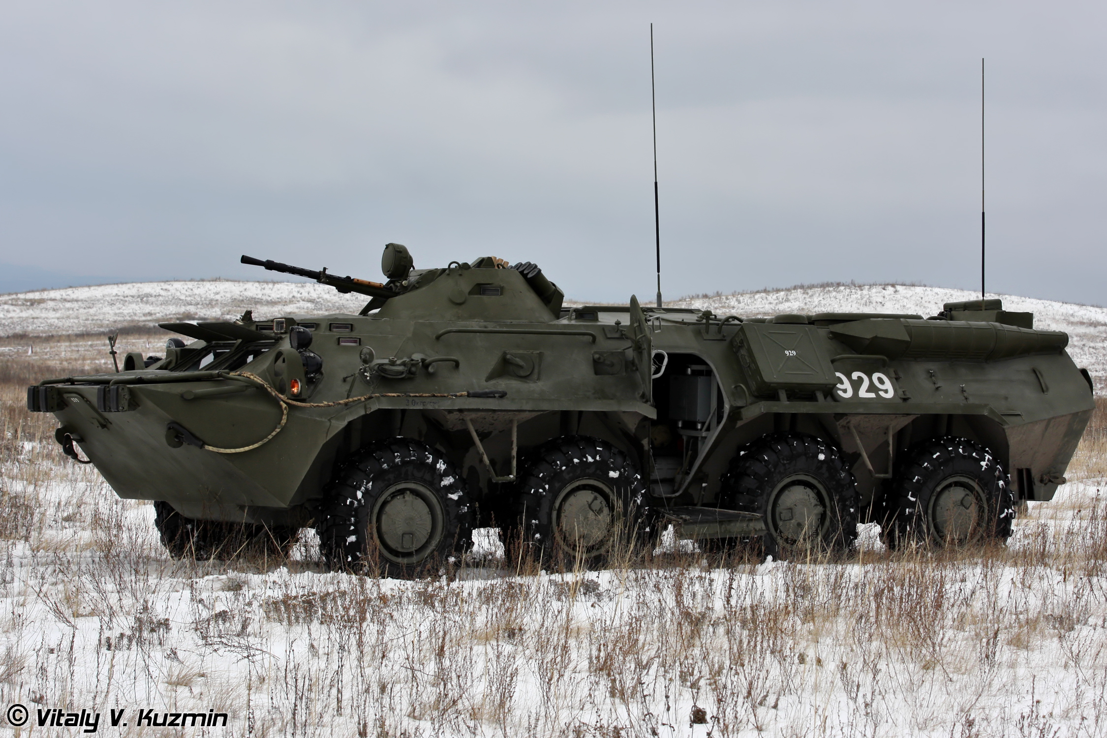 Поскольку засечка ядерных взрывов действие достаточно условное, не сопровождающееся активными передвижениями техники и личного состава, то нам показали в основном ведение РХБ разведки. Машина радиационной и химической разведки РХМ-4-01 осуществляет РХБ разведку и отбор проб грунта на зараженной местности (Reconnaissance chemical vehicle RKhM-4-01 providing CBRN reconnaissance actions)